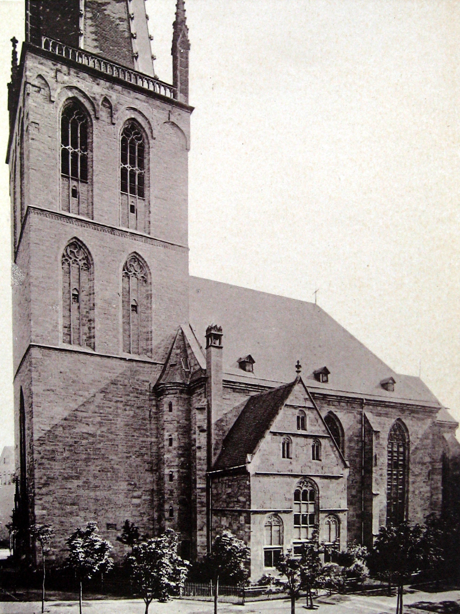 Petrikirche Dortmund Außenansicht Foto 1894